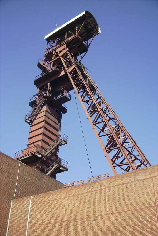 Bildbeschreibung: Zeche Sophia Jacoba, Förderturm Schacht 3, Hückelhoven Quelle: eigenes Foto. Fotograf/Zeichner: bodoklecksel 15:33, 16. Jun 2006 (CEST)... Datum: Juni 2006 Sonstiges: ...